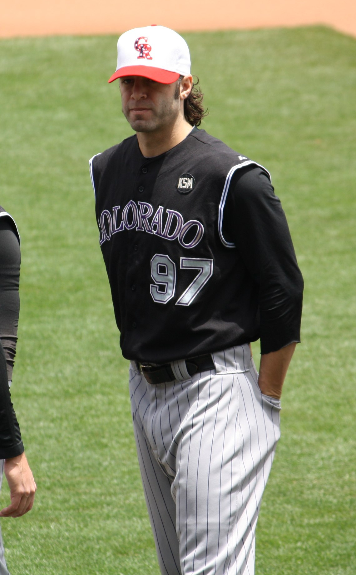 Joe Beimel